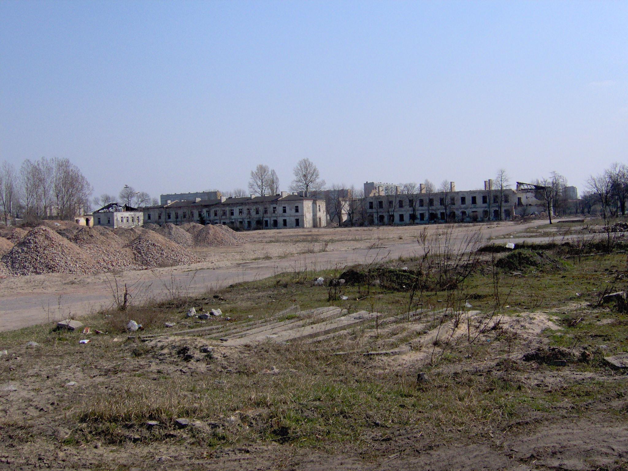 Pozostałości po byłej jednostki wojskowej przy ul. Żytniej 83 (2007 r.)